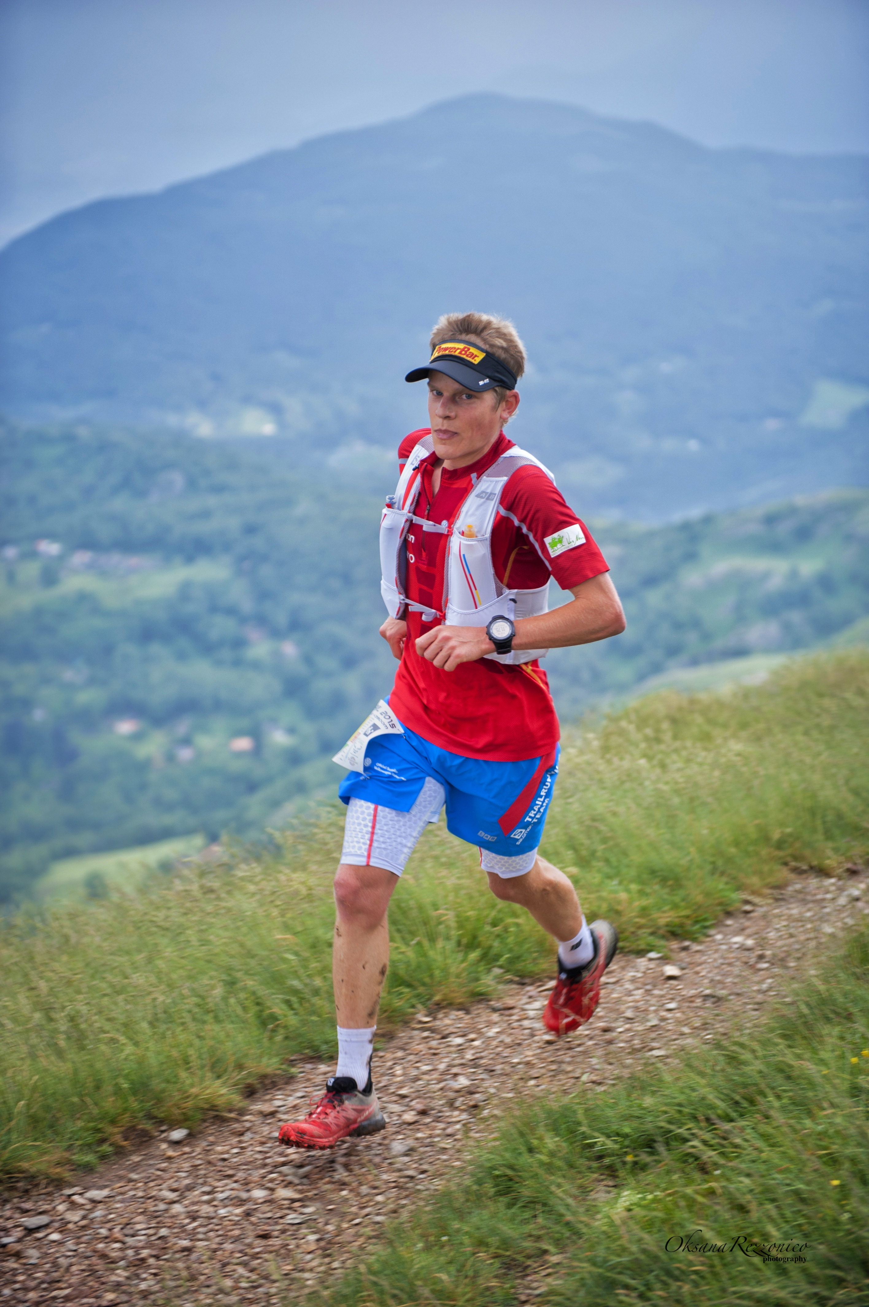 Stephan Hugenschmidt, vincitore dello Scenic Trail 2015